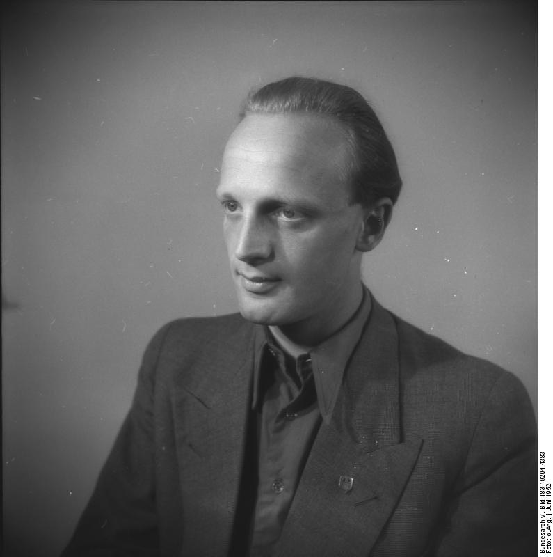 Zentralbild 11.6.52 Lippmann, Heinz